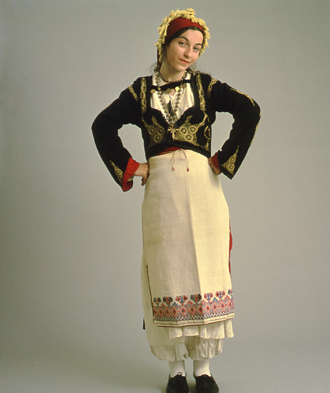 Γυναικεία φορεσιά από τα Ανώγεια Κρήτης. Συλλογή Πελοποννησιακού Λαογραφικού Ιδρύματος, Ναύπλιο